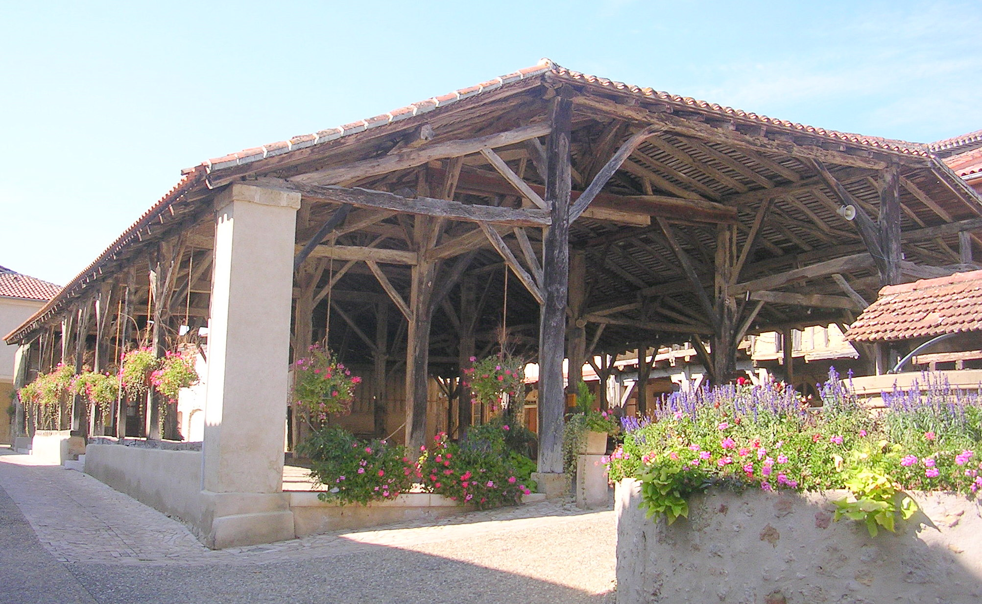 Bassoues (Gers, france), la halle